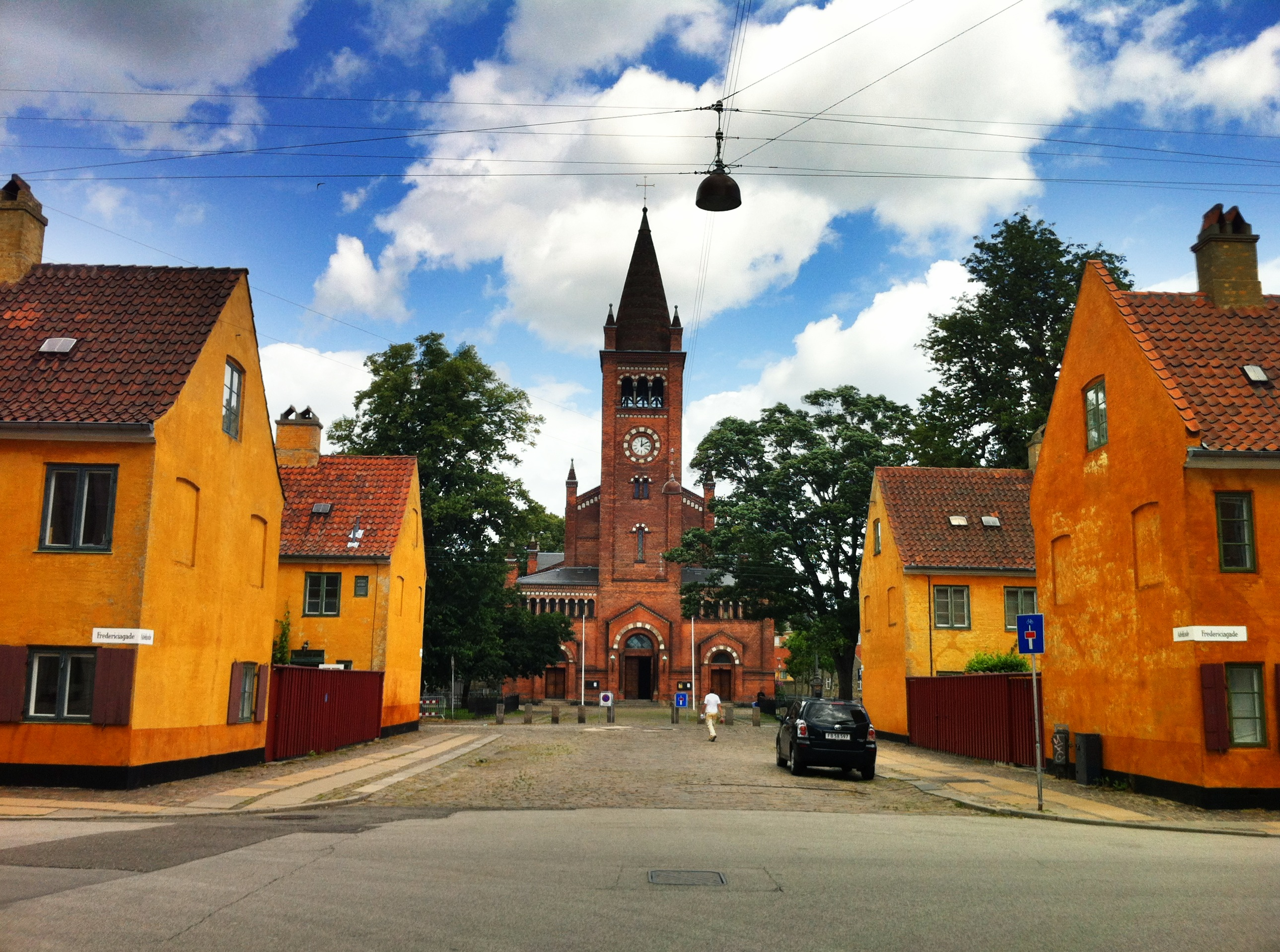 Копенгаген